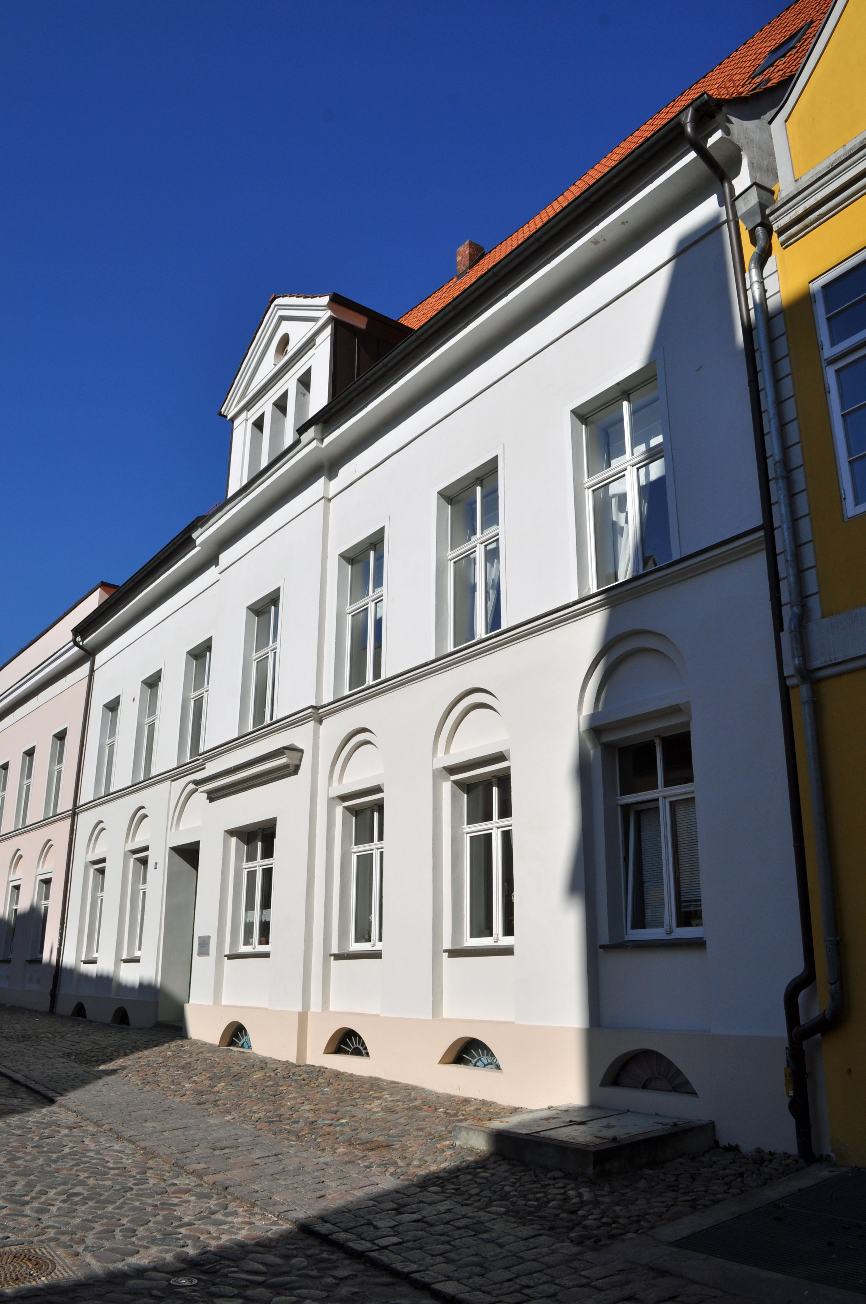 Gebäude bzw. Gebäudedetail in Stralsund. Straße und Hausnummer siehe Dateiname.